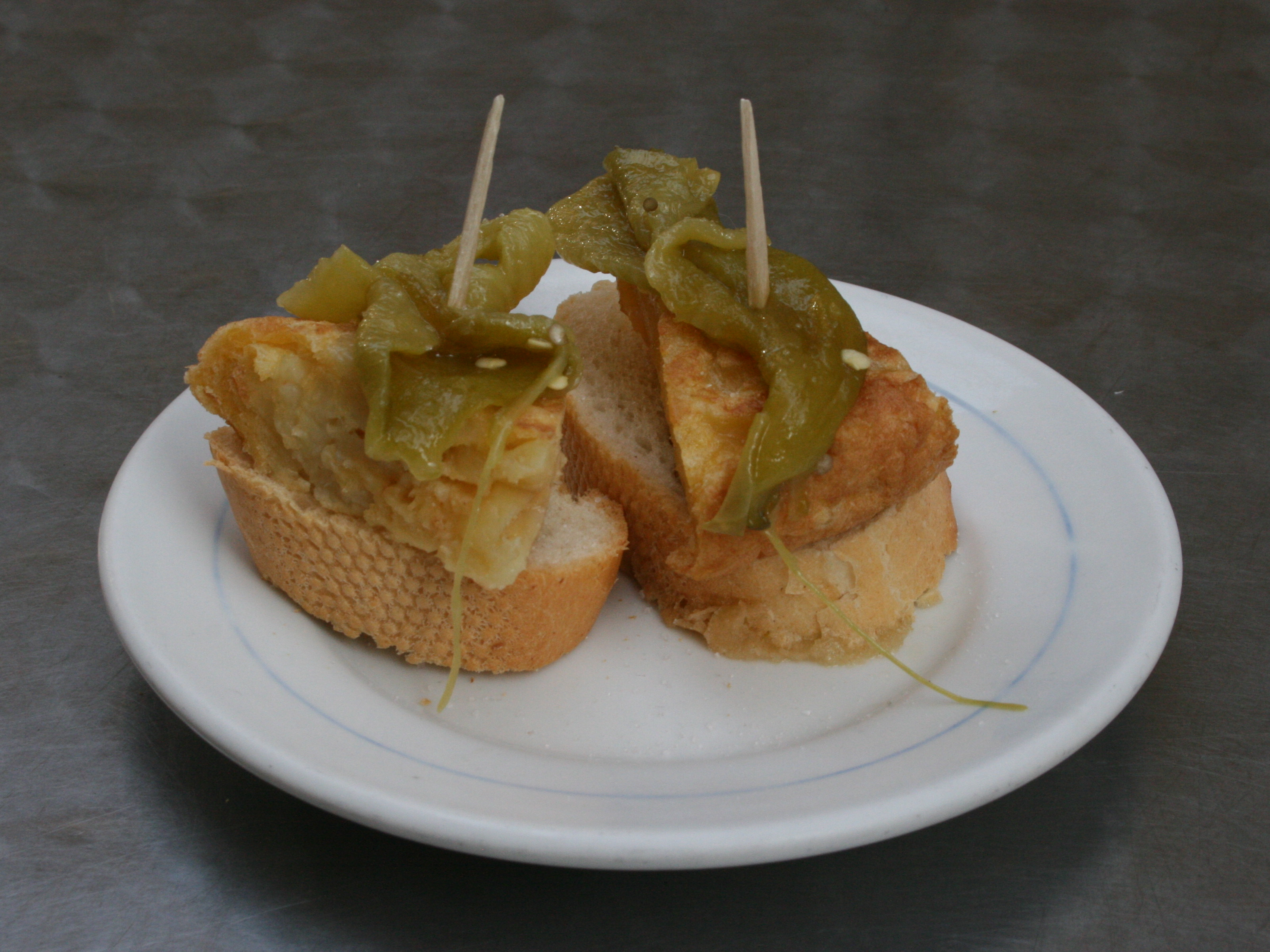 Tapa de tortilla y pimiento verde - 2011